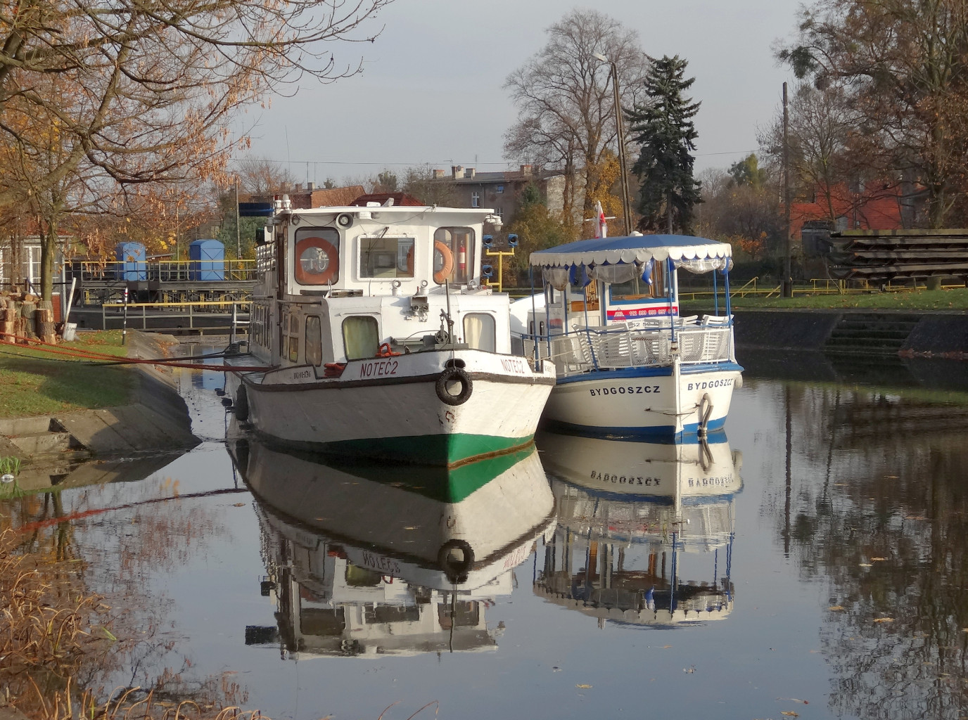 Marina "Gwiazda" na Kanale Bydgoskim przy ul. Bronikowskiego/Nakielskiej